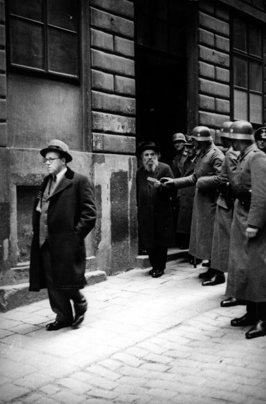 Wien, SS-Razzia bei jüdischer Gemeinde Juden-Razzia in Wien im israelitischen Gemeindehaus. März 1938 [Österreich, Wien.- Razzia der SS in der israelitischen Gemeinde (Gemeindehaus)]